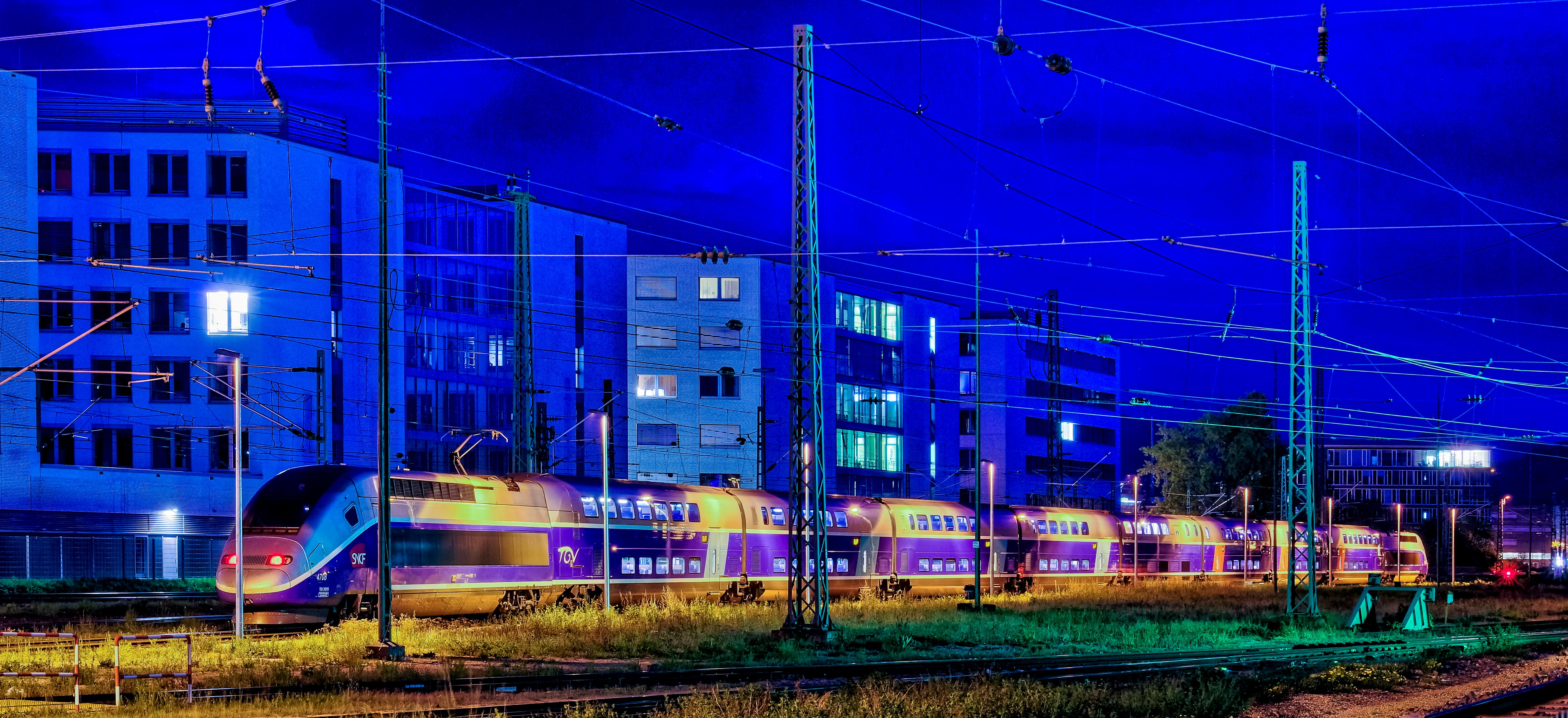 Bilder aus Freiburg im Breisgau Der TGV in Freiburg am Hauptbahnhof